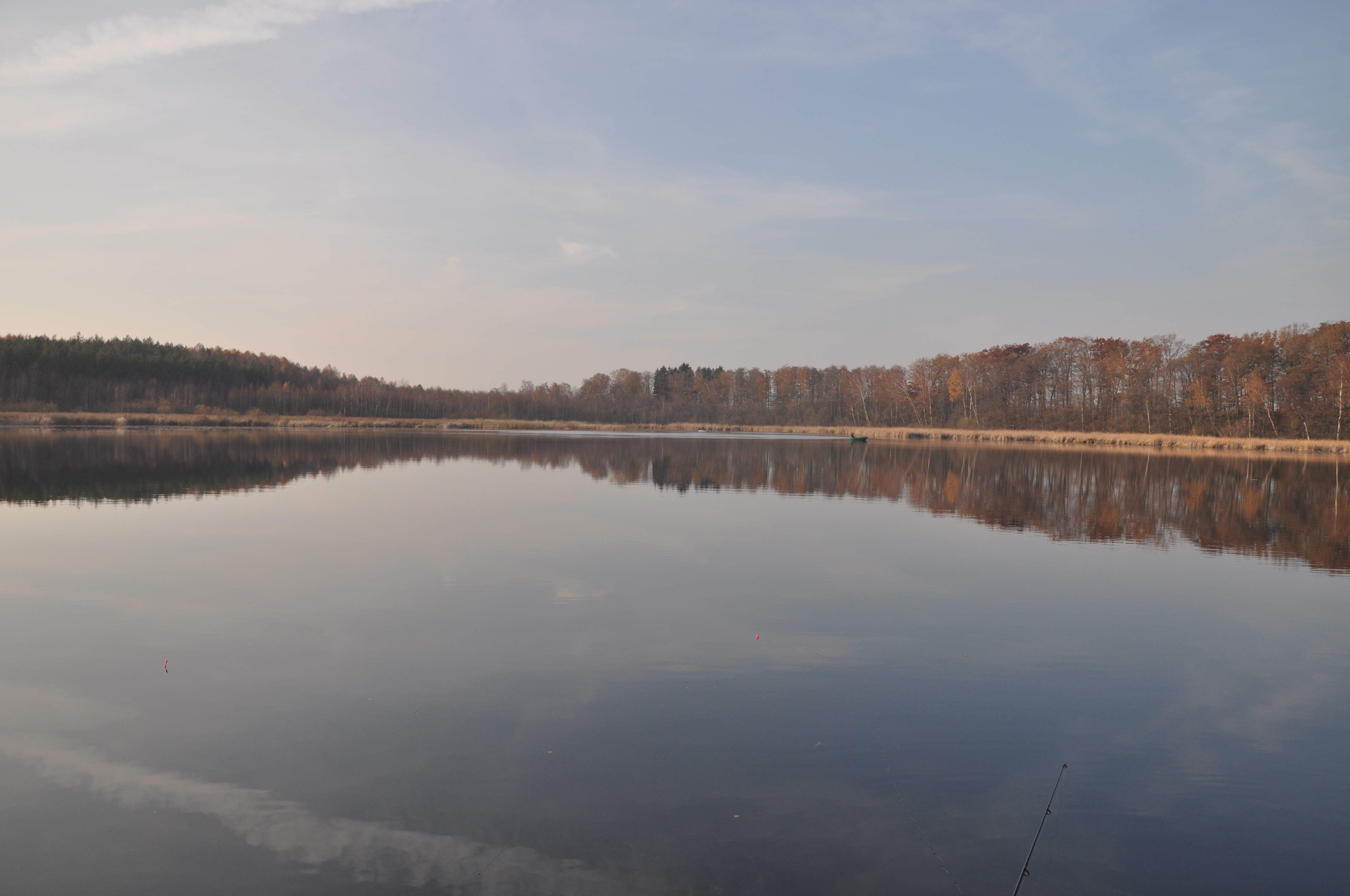 Jezioro Trzynik z mostka wędkarskiego w kierunku północno-zachodnim